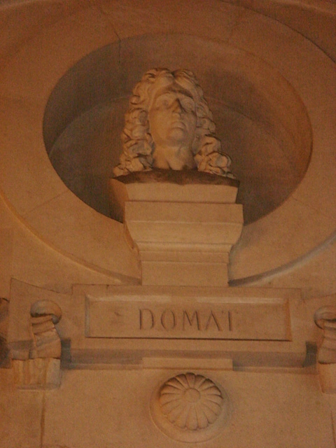 Buste de Jean Domat (1625 - 1696), jurisconsulte du XVIIe siècle, grand hall de la faculté de droit de Paris II-Panthéon-Assas à Paris.